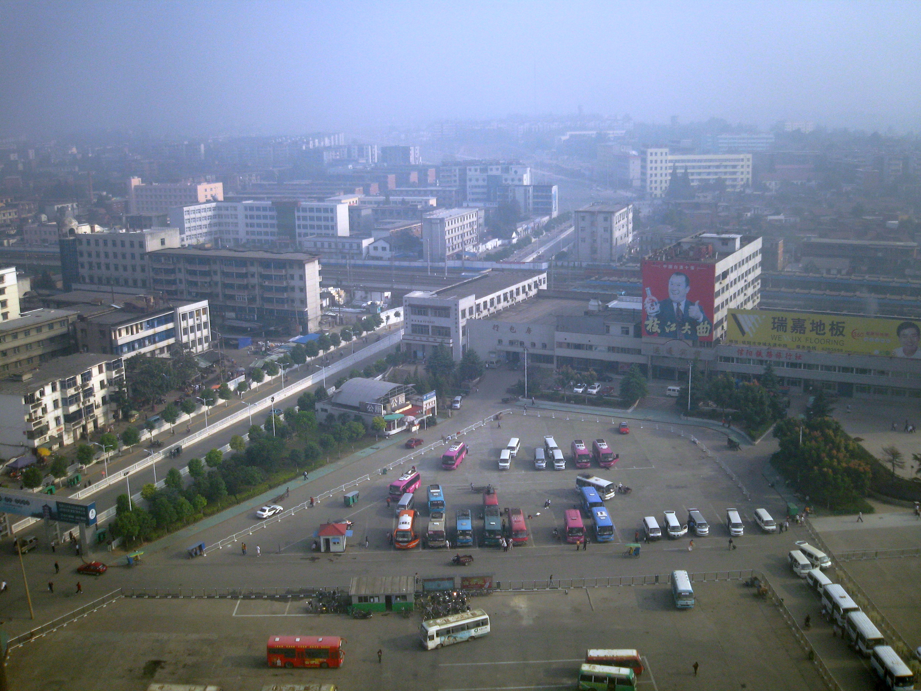 中文（中国大陆）: 信阳鸟瞰